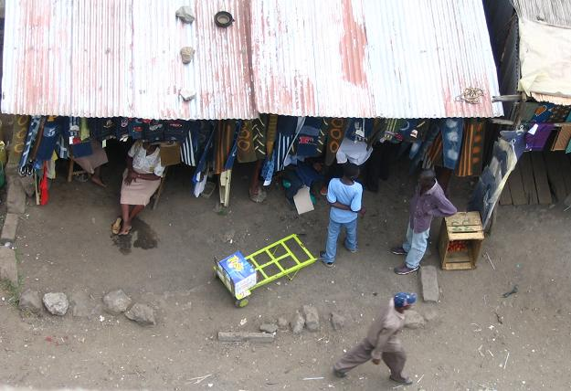 Markt in Kenia (bovenaanzicht)